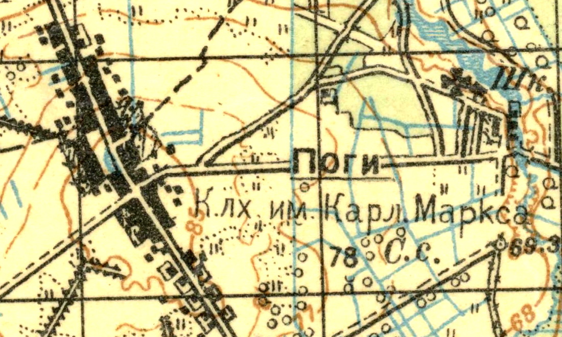 Топографическая карта Ленинградской области, квадрат О-36-14-А (п. Фёдоровский), деревня Поги